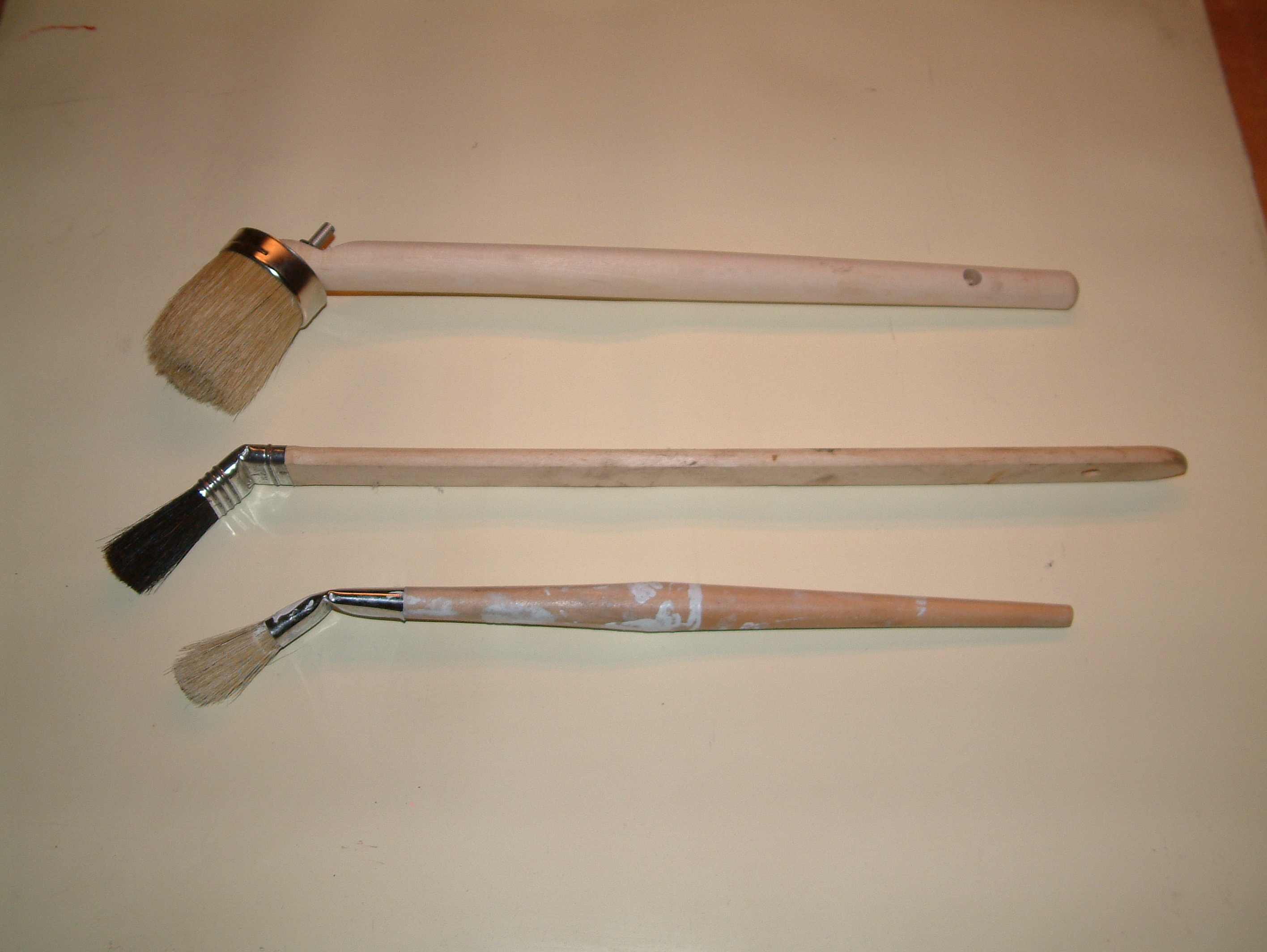 Het verschil tussen een bokkepoot, radiatorkwast en een schilderskwast